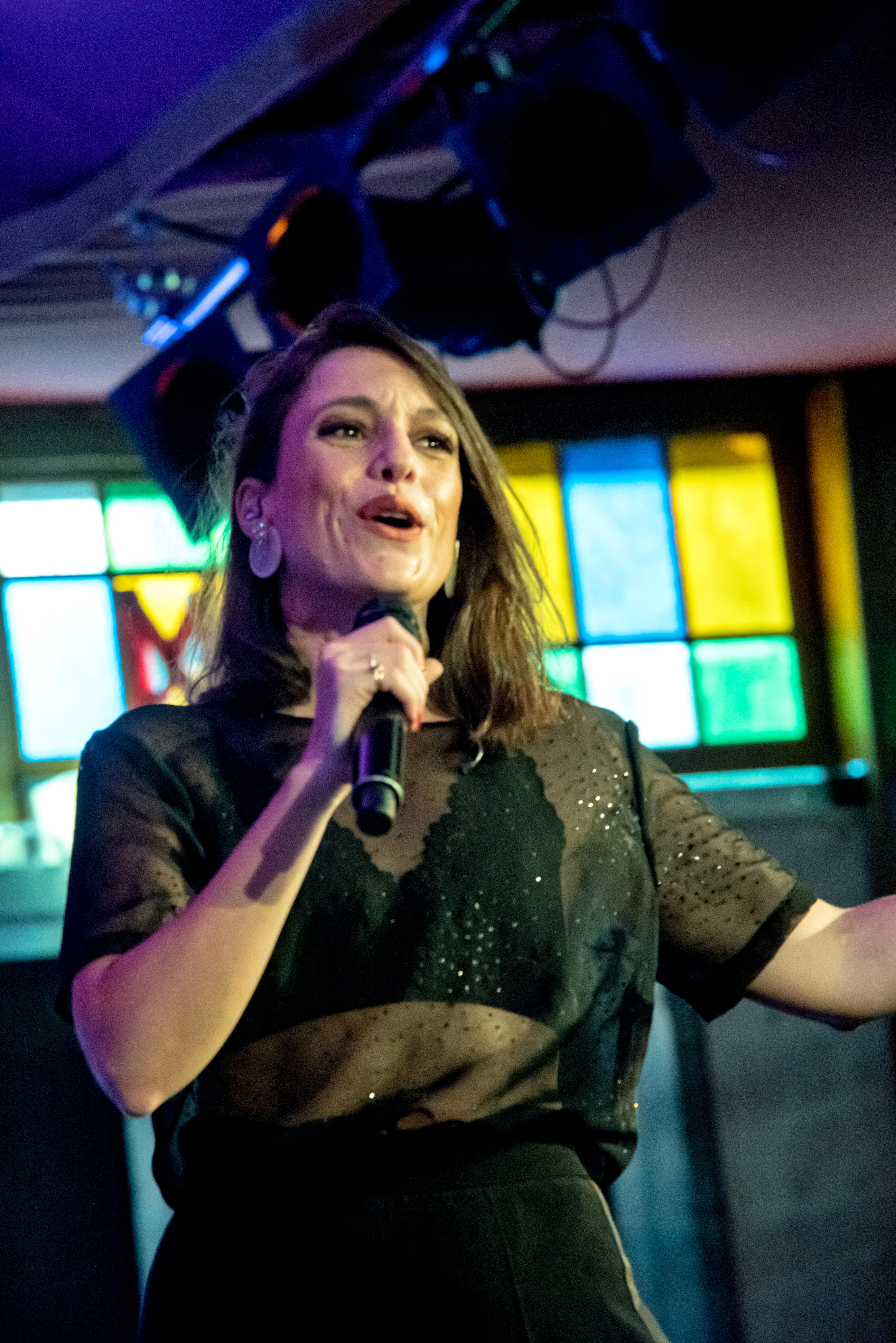 Bilder vom Zelt Musik Festival 2018 in Freiburg im Breisgau Auftritt Carminho am 24. Juli 2018 im Spiegelzelt